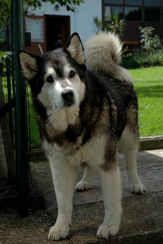 Cachorrote de Alaska Malamute Foto de un alaska malamute. Realizada por Radio Tonreg y compartida en Flickr aquí